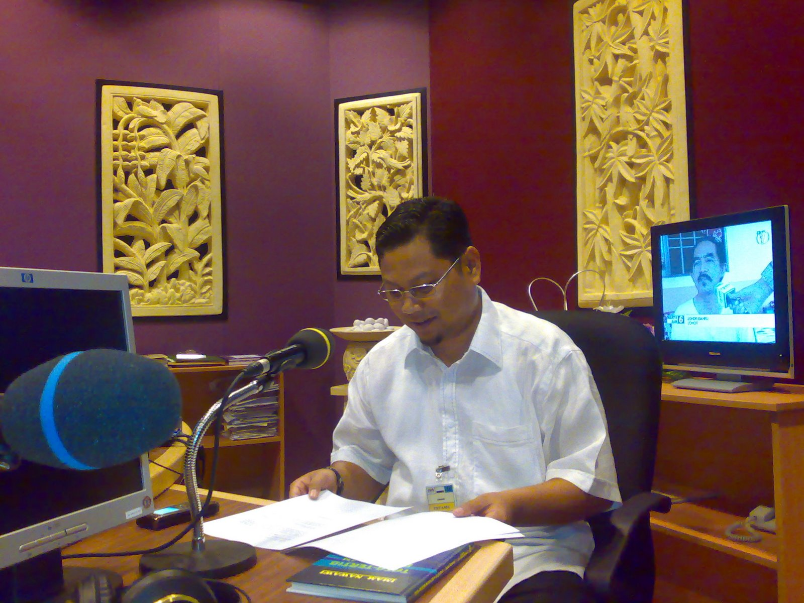 Badli Shah di konti PahangFM pada 19 Mei 2008